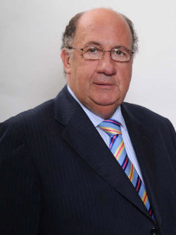 Roberto León Ramírez